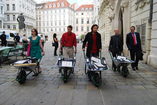 Der österreichische AKVorrat übergiebt dem Verfassungsgerichtshof (VfGH) 11.139 Vollmachten für die Verfassungsklage gegen die Vorratsdatenspeicherung in Österreich